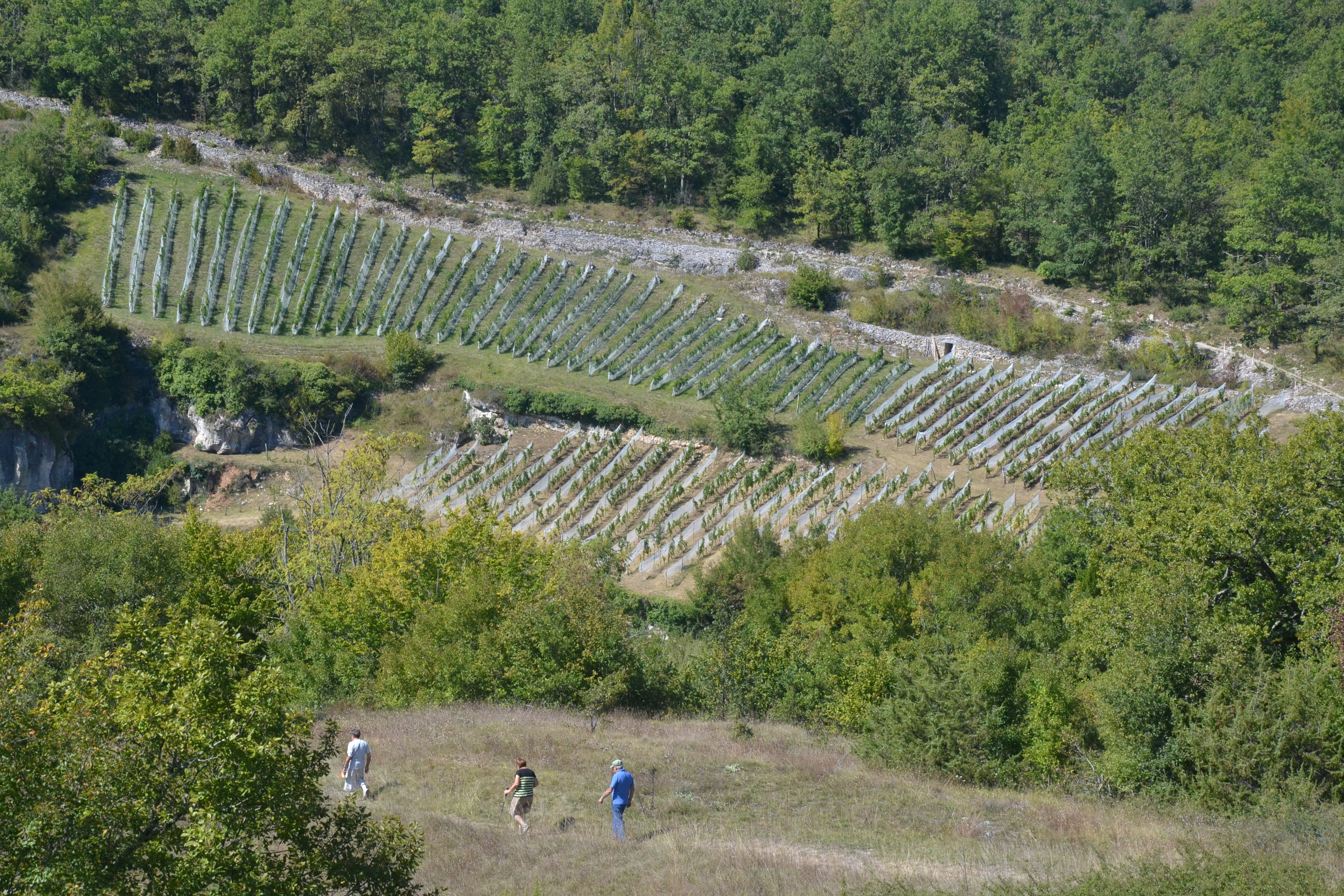 Vignes à Chasteaux (Corrèze, France).